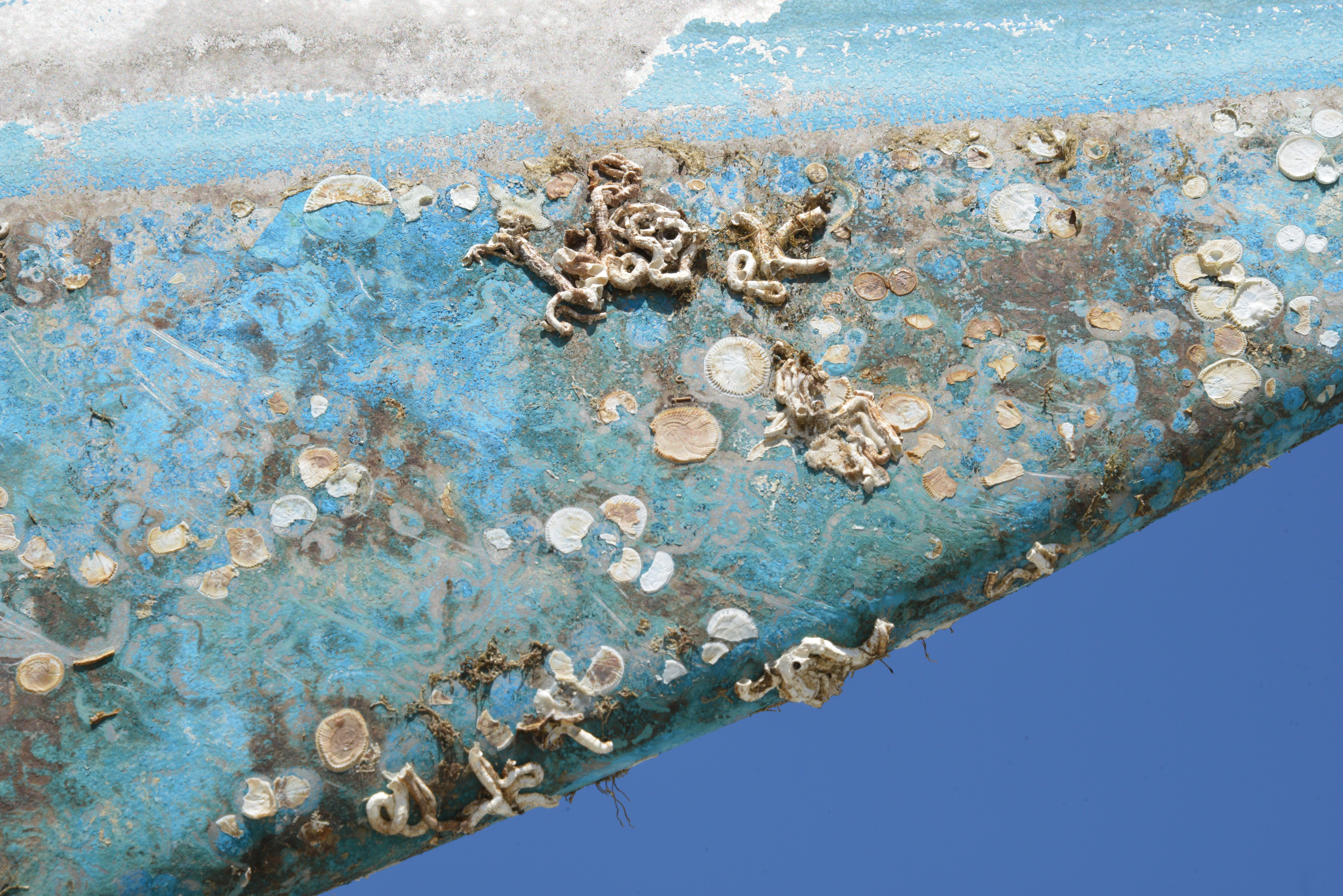 Restes de coquillages et d’algues sur la carène du voilier de course «Ocean Planet» après nettoyage au jet d’eau à haute pression. Plateau nautique de la Ville en Bois. Image avec la luminosité diminuée et le contraste augmenté par rapport à la photographie originale. La Rochelle, Charente-Maritime, France.